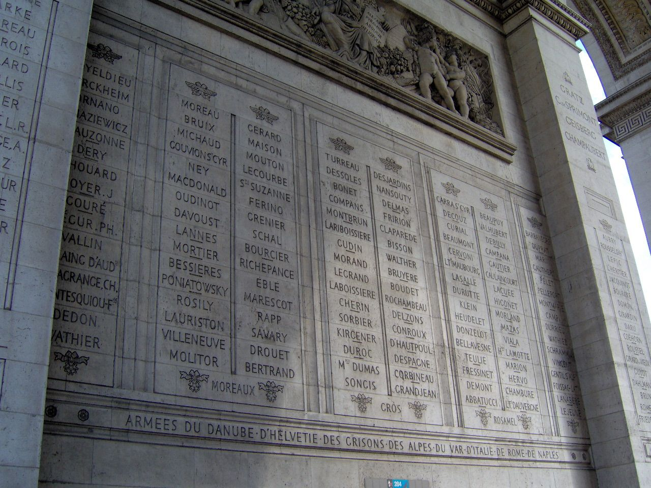 Arc de Triomphe